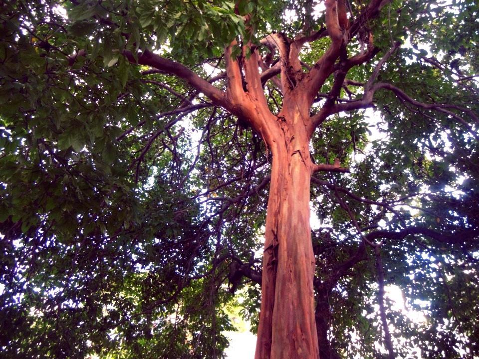 sementes maduras de araçá-d´água / Capitão pelado - Terminalia kuhlmannii